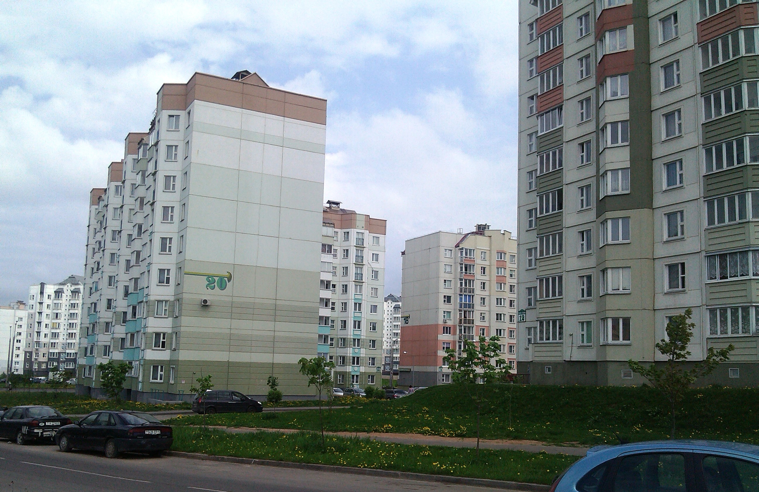 Мінск, вуліца Алеся Гаруна.